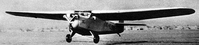 Praga E 114